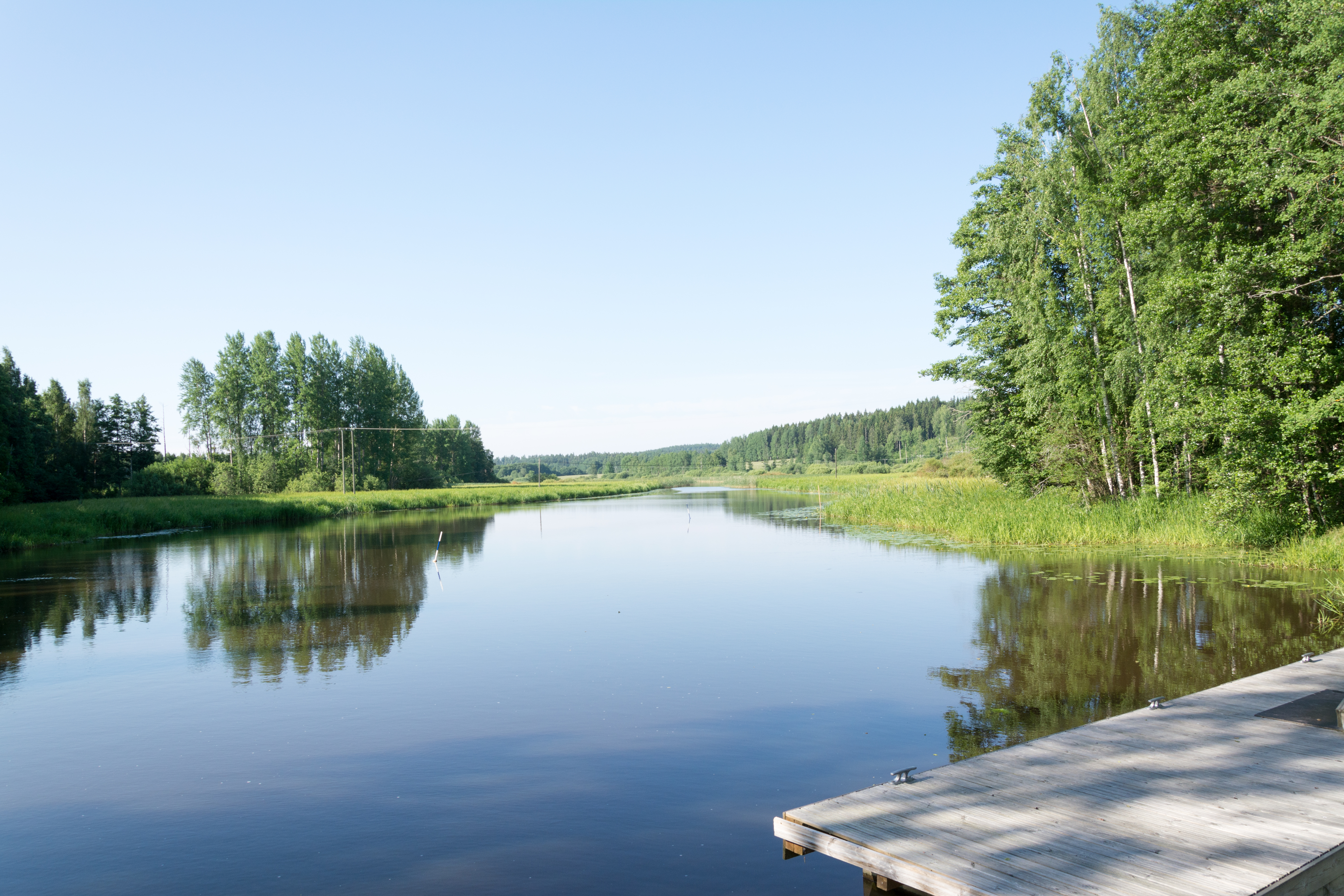 Vääntenjoen sulku Lohjalla